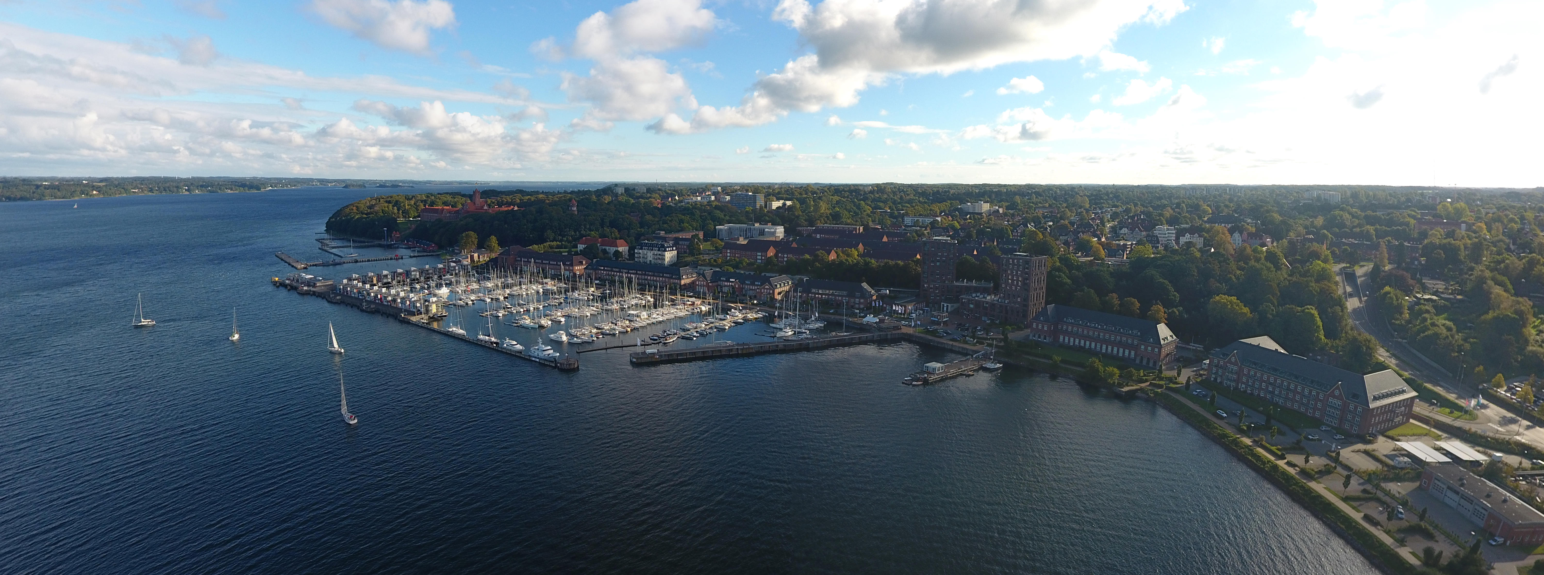 Panorama von Sonwik